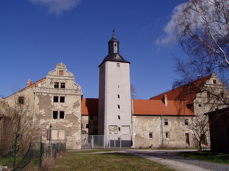 Südansicht der Burg Schneidlingen, März 2004, © Heiner Schwarzberg